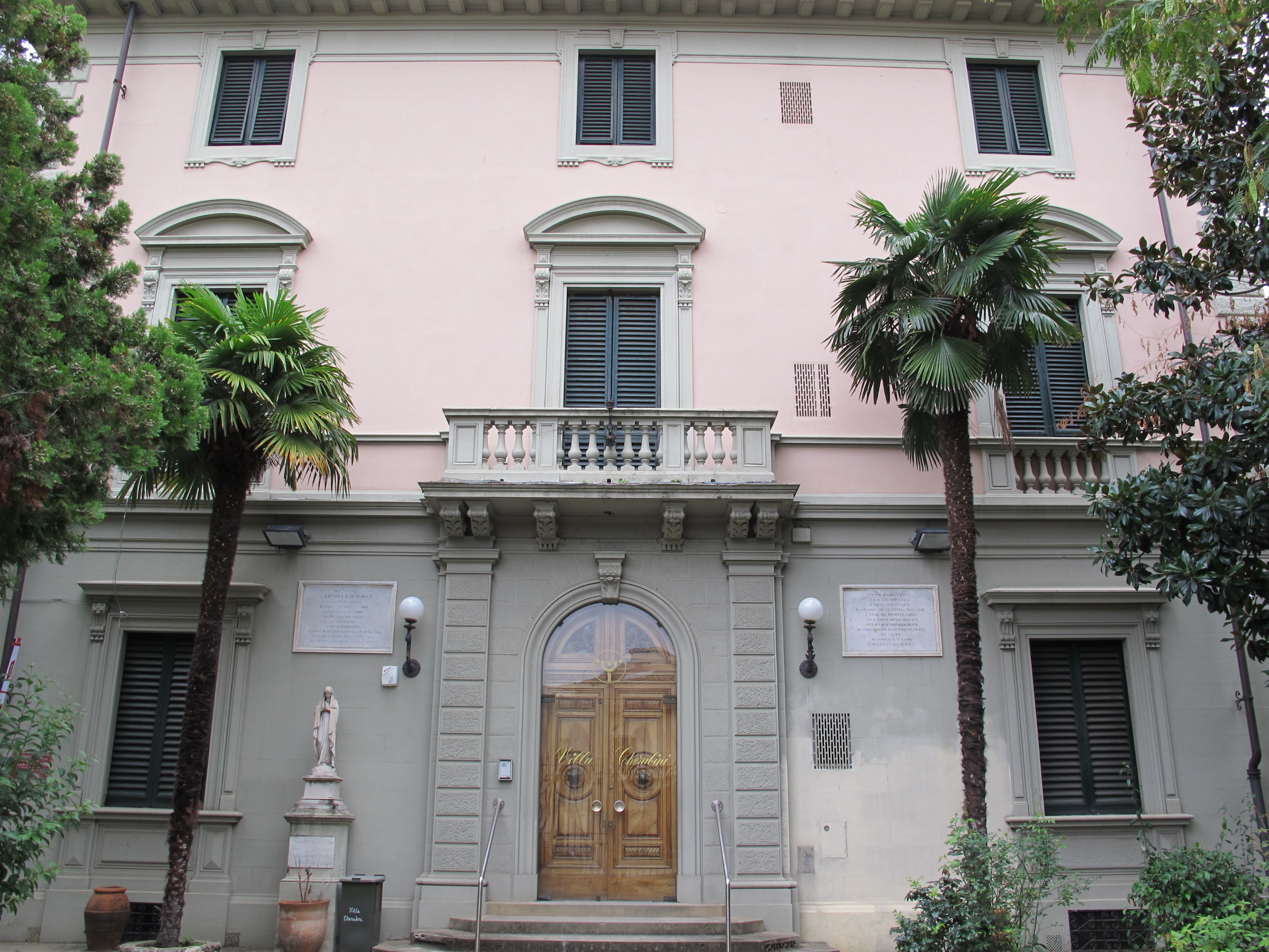 Via luigi salvatore cherubini, casa di la marmora